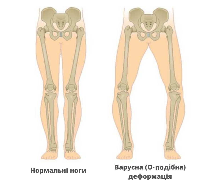 Варусна (О-образна) деформація ніг